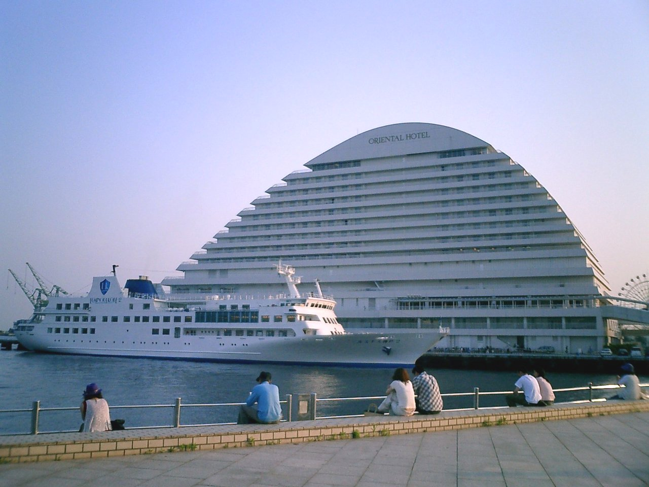 Kobe-merikenpark-oriental-hotel